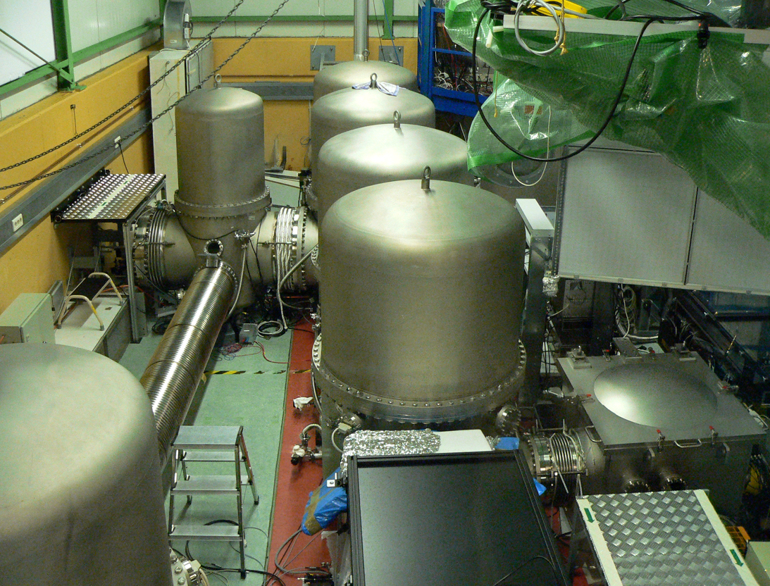 GEO 600 Ruthe Labor